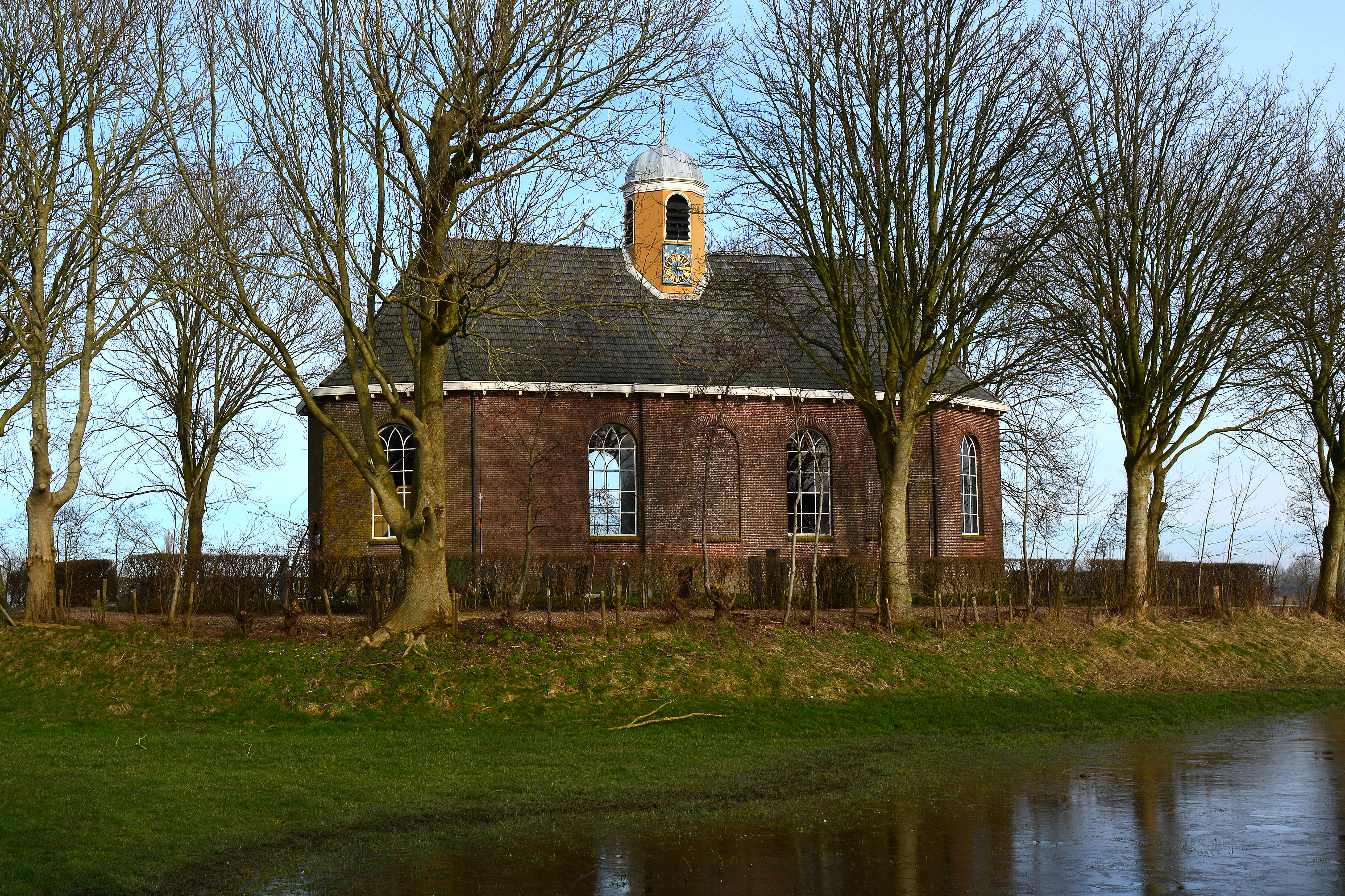 Sweins, Protestanske Reginatsjerke